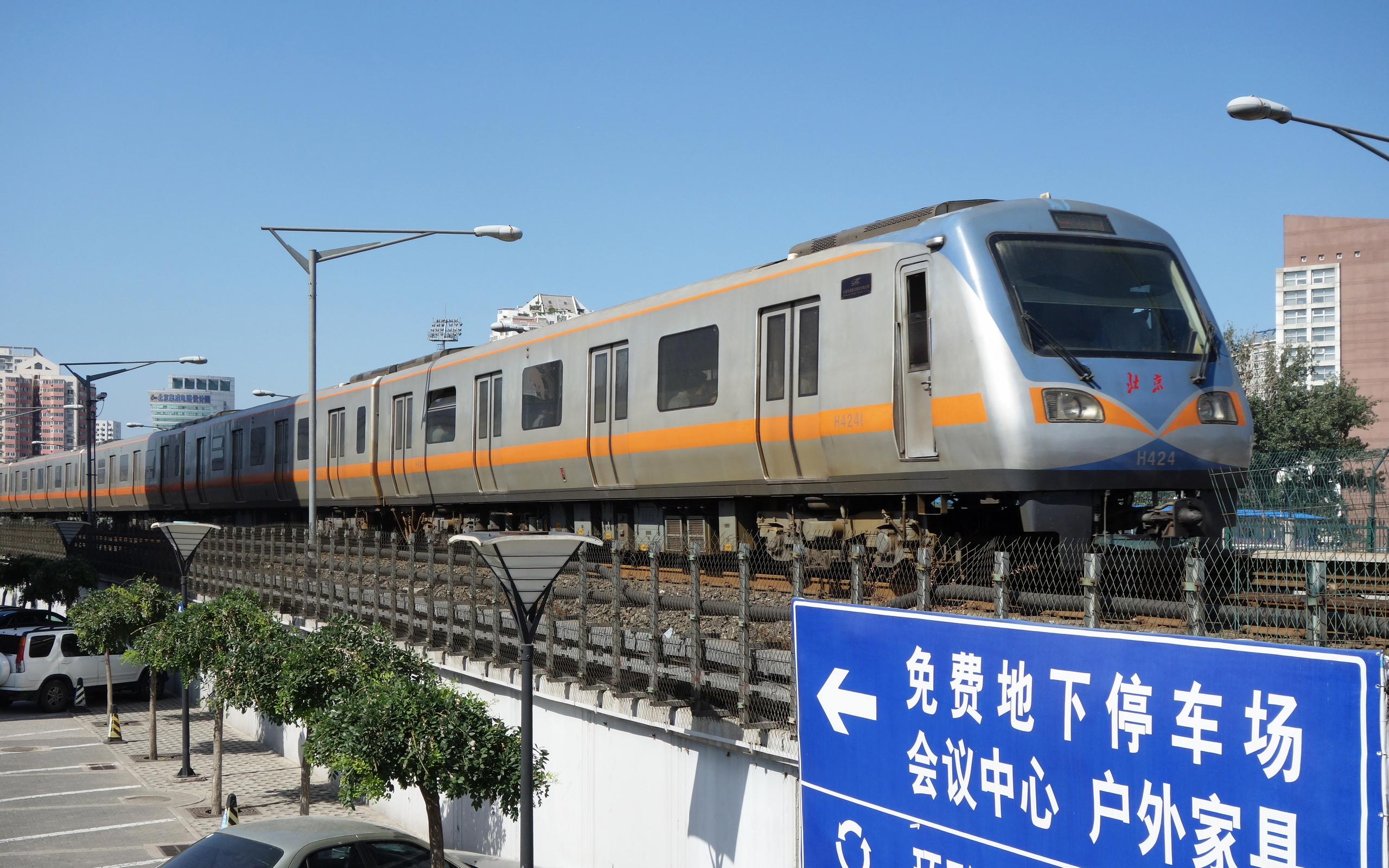 北京地铁13号线DKZ5型H424号列车驶近大钟寺车站.